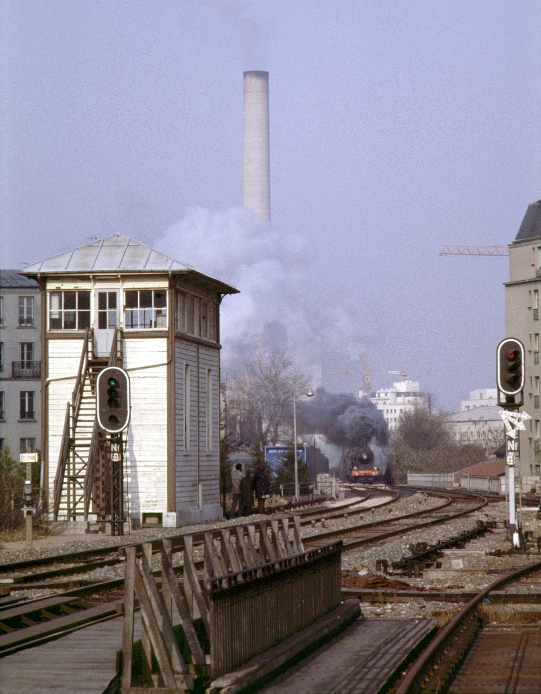 Le poste d'aiguillage de la gare de Belleville-Villette sur la Petite Ceinture de Paris le 19 novembre 1983.